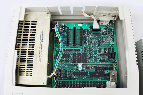 Какво има в Правец 8C